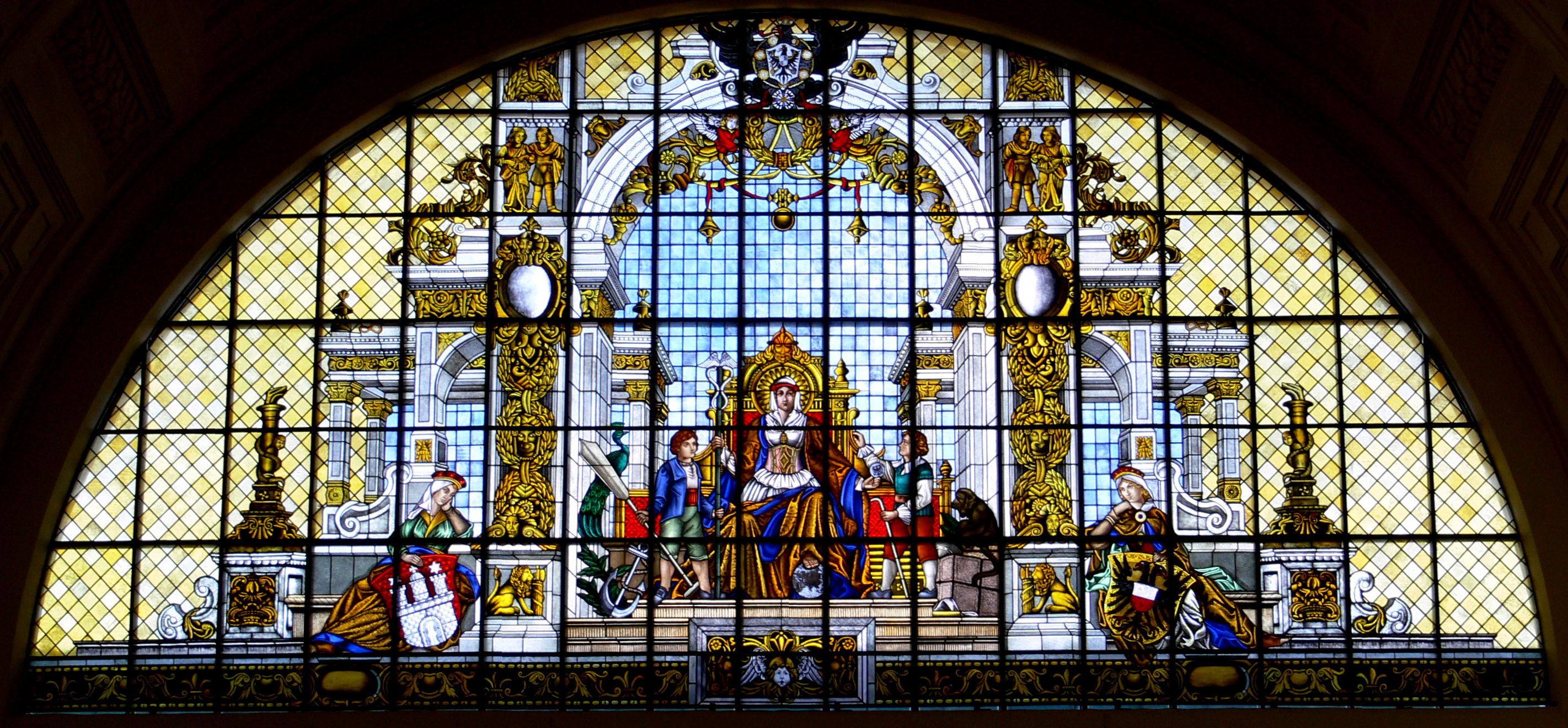 Leipzig, Reichsgerichtsgebäude, Wartehalle Nördliches Glasfenster von Alexander Linnemann zum Thema "Schiffbau und Schiffahrt" und den Stadtwappen von Hamburg und Lübeck